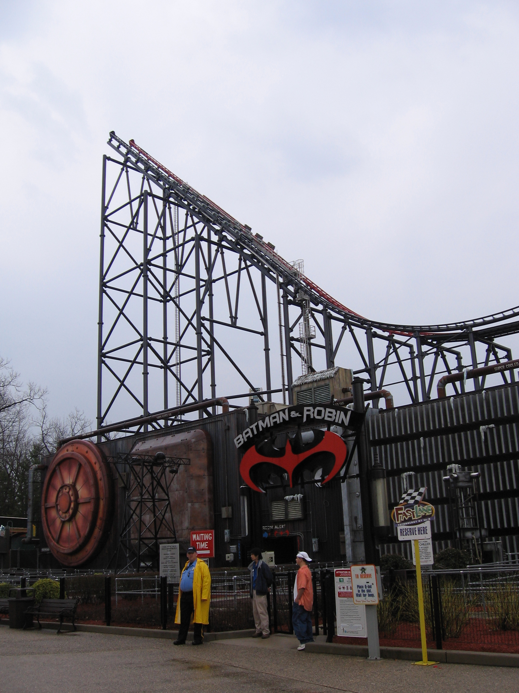 Took it myself. Dusso Janladde 04:41, 2 April 2006 (UTC)